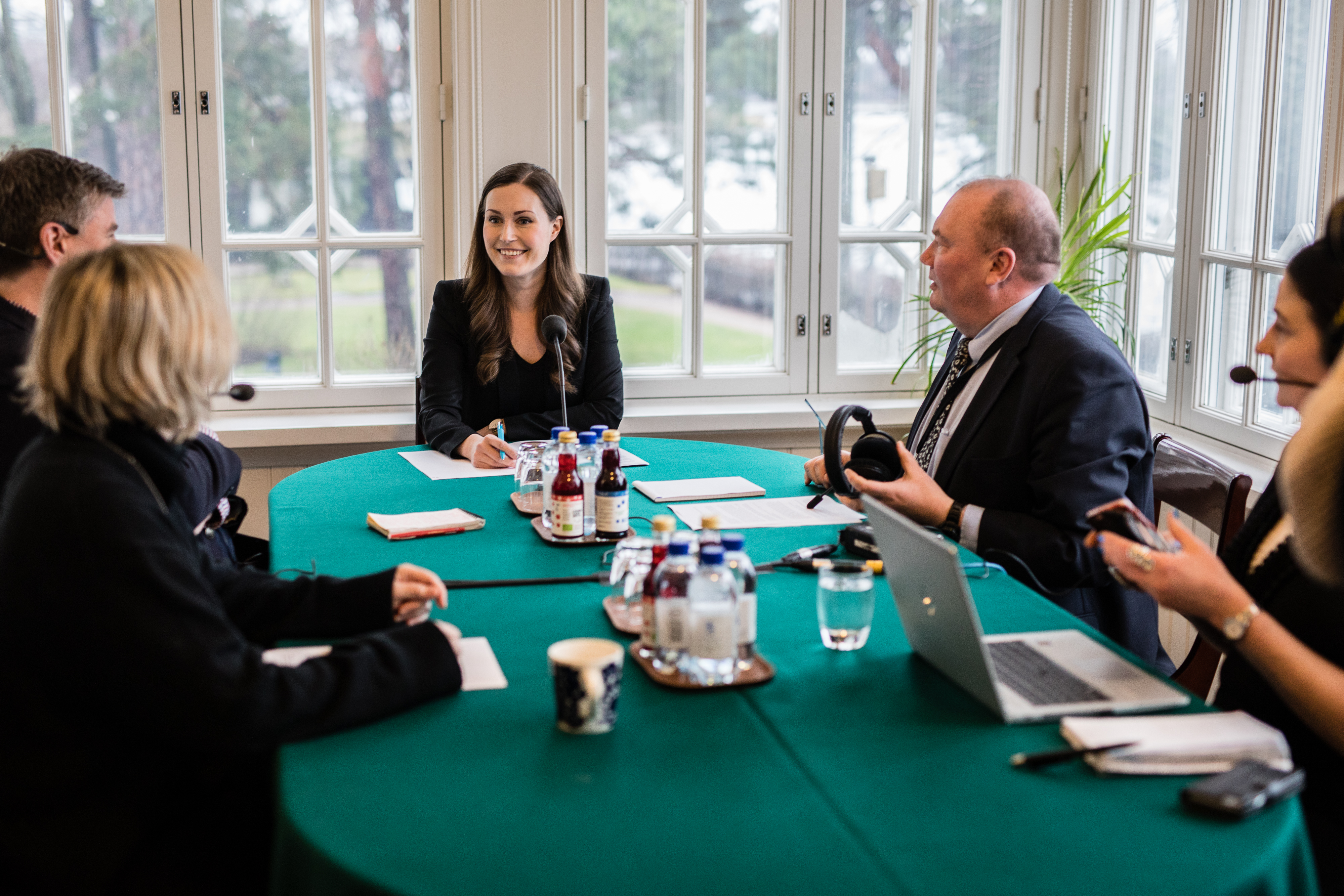 Pääministeri Sanna Marinin ensimmäinen pääministerin haastattelutunti Kesärannassa. © Laura Kotila | valtioneuvoston kanslia